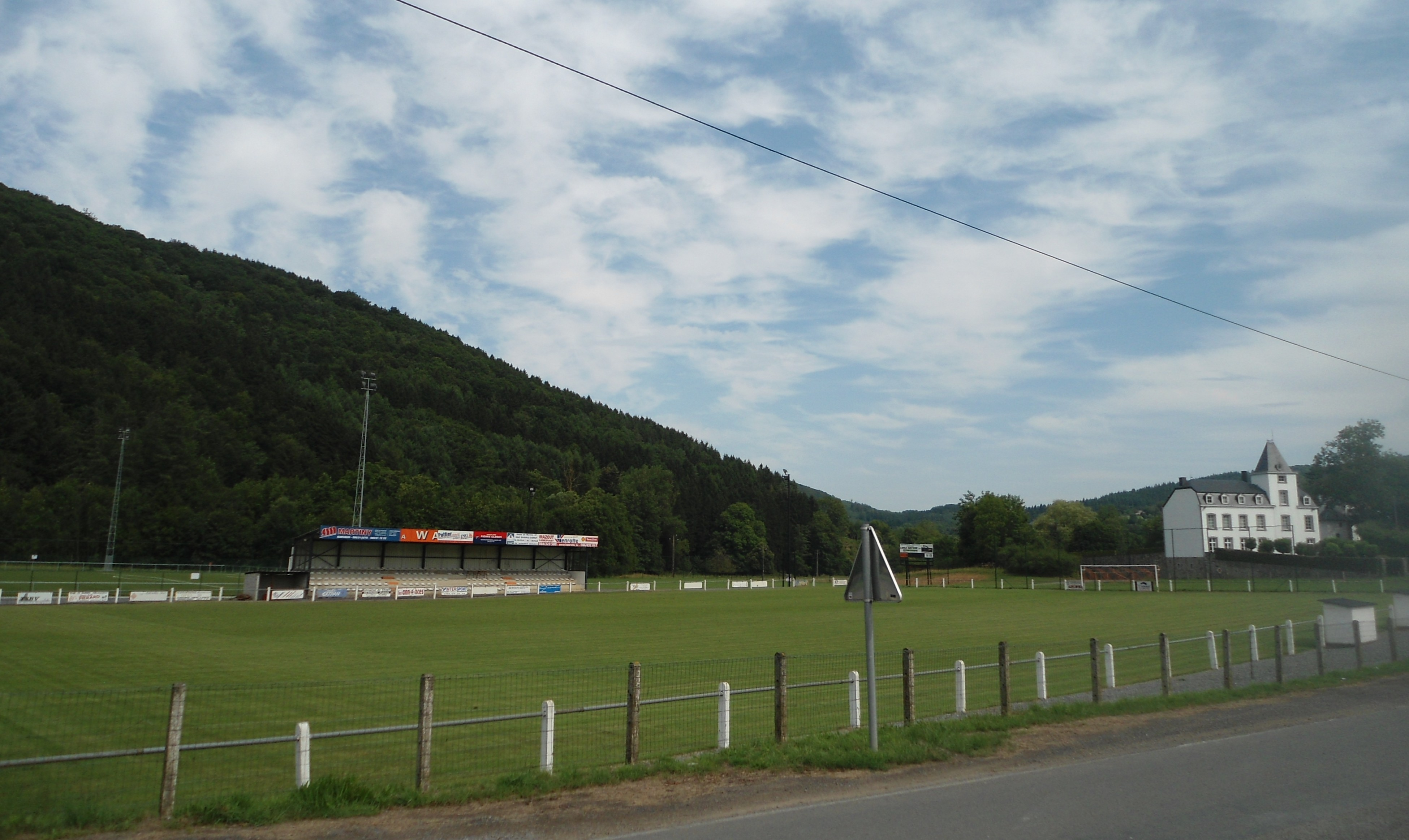 Stade du RC Mormont à Laforge (Erezée)